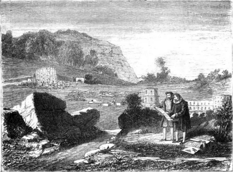 Salomon de Caus exerçant les fonctions d'ingénieur du roi dans la ville de Paris.